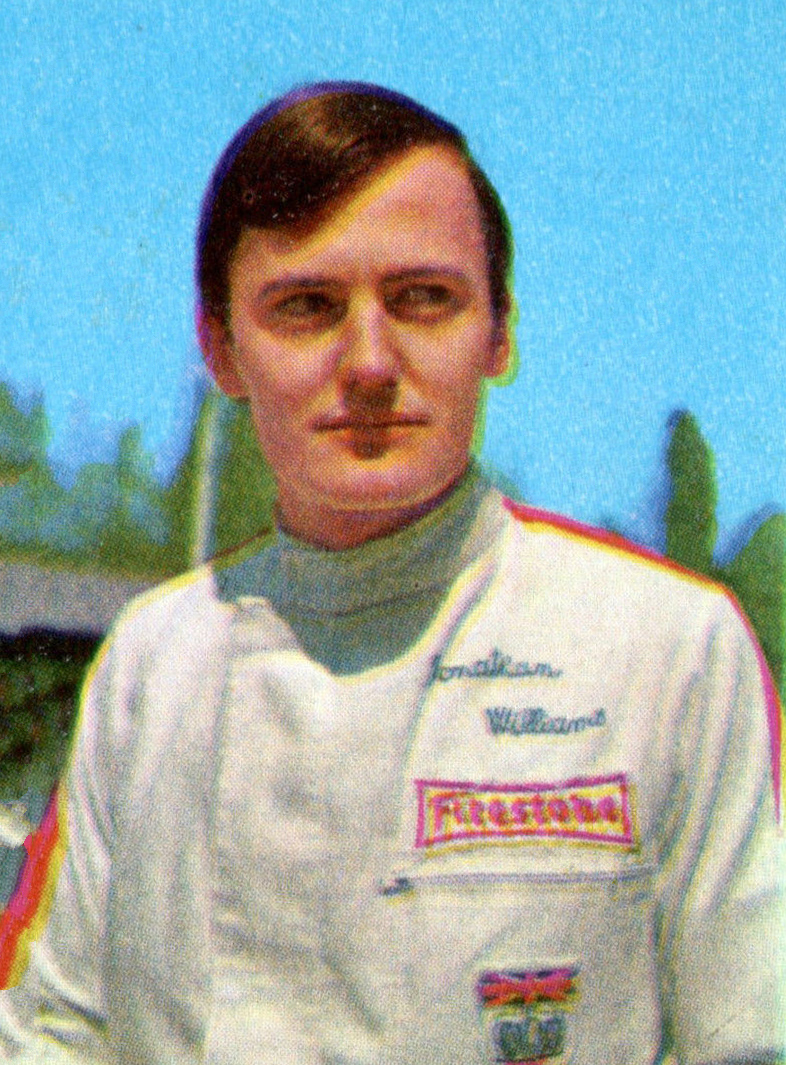 CAMPIONI DELLO SPORT 1967/68 Figurina/Sticker -n. 107 - J. WILLIAMS